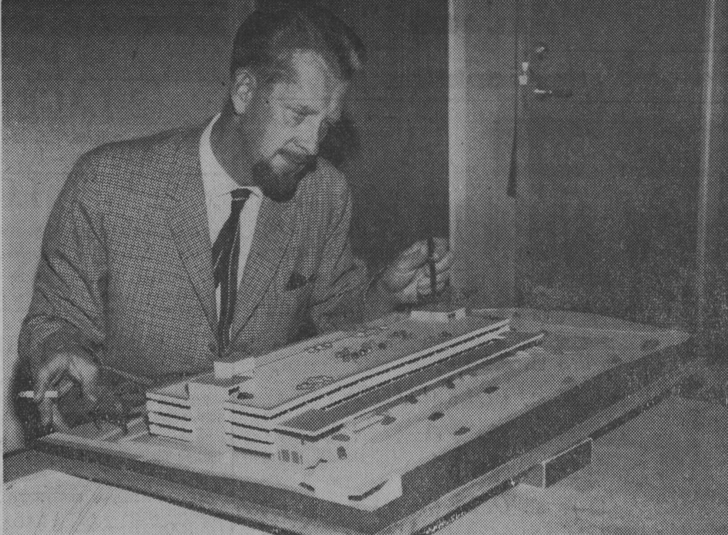 Arkitekten Dag Efvergren med modell av p-hus i Vällingby